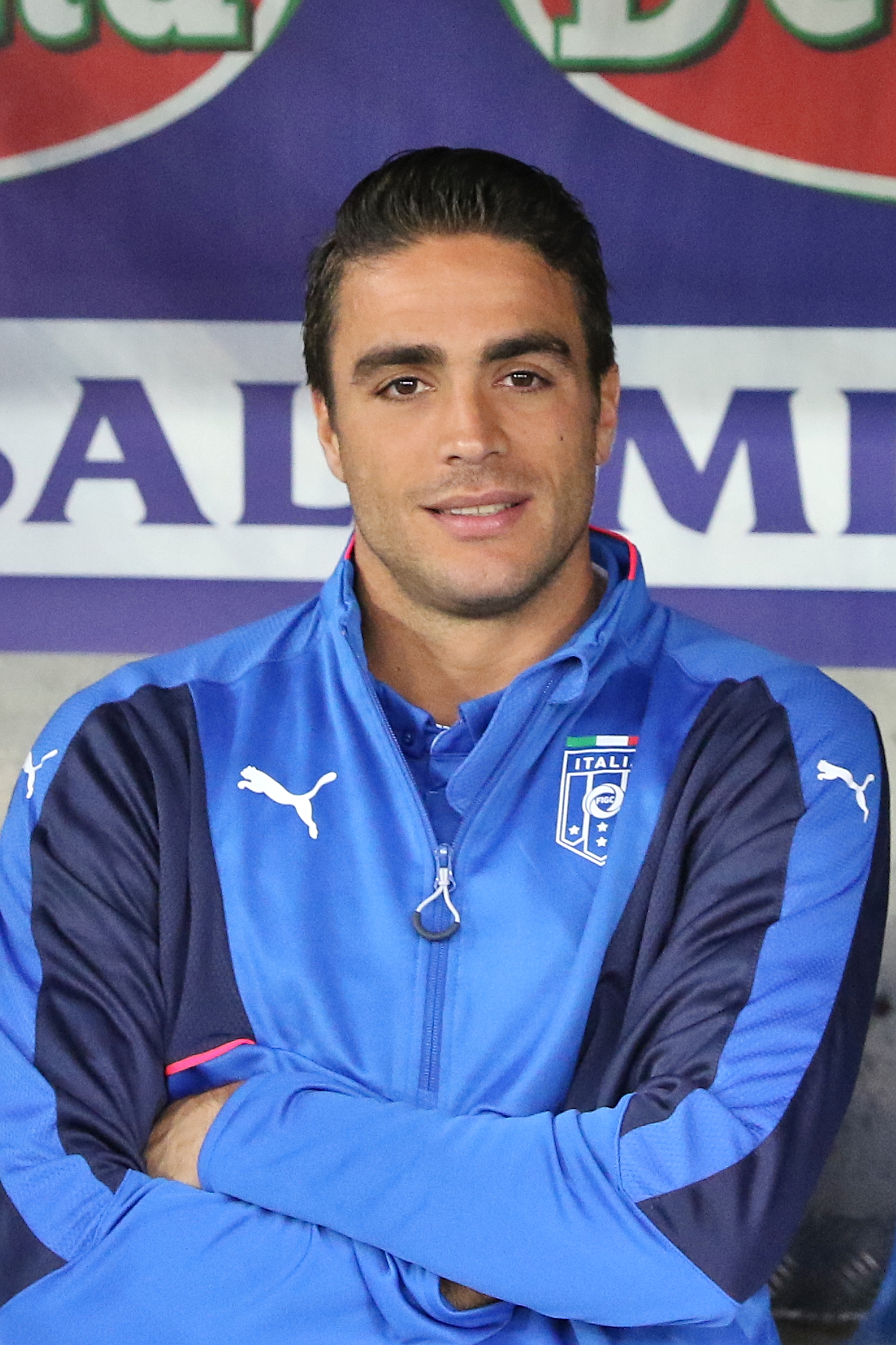 20150616 - Portugal - Italie - Genève - Alessandro Matri